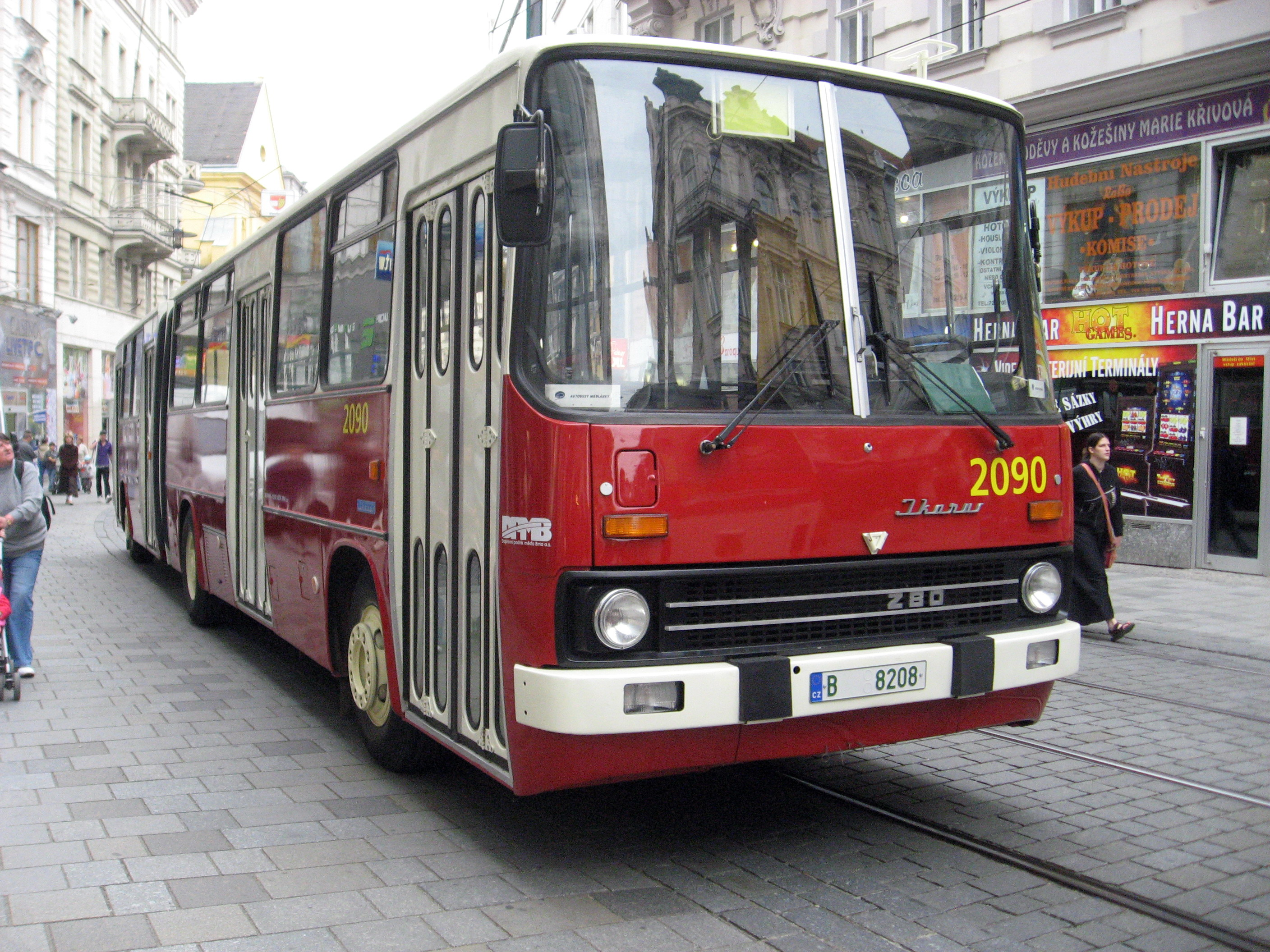 Ikarus 280 v Brně